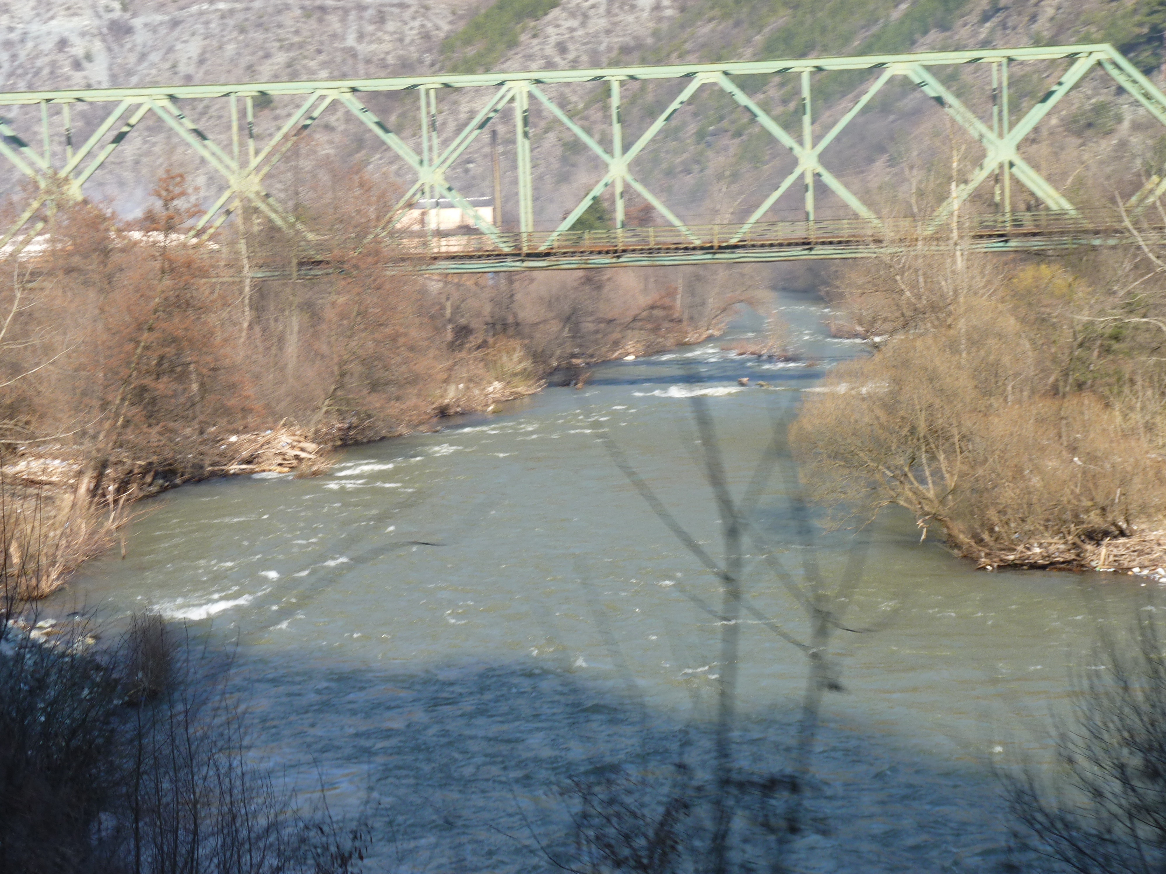 Reka Ibar